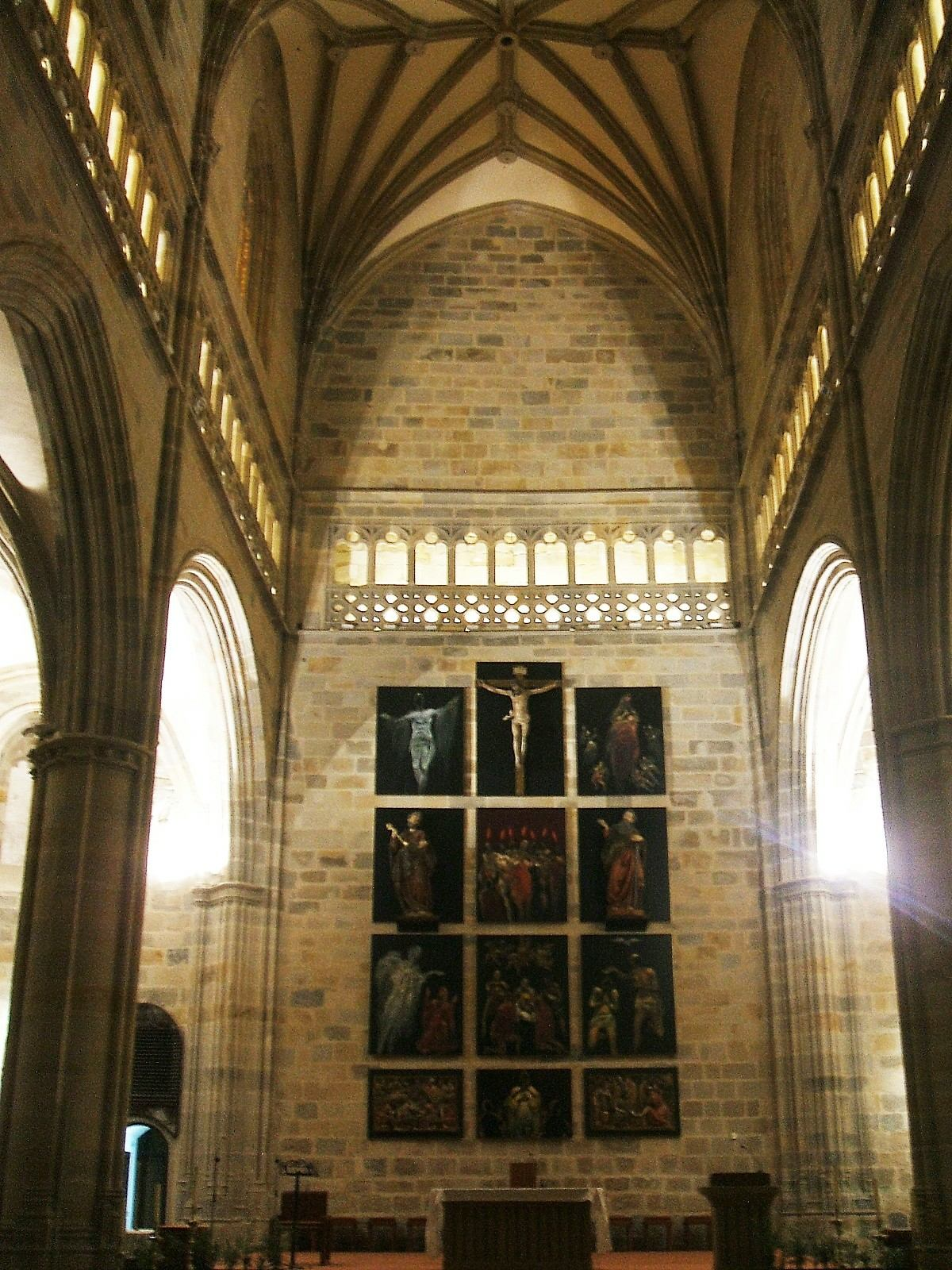 Iglesia de San Antón, Bilbao